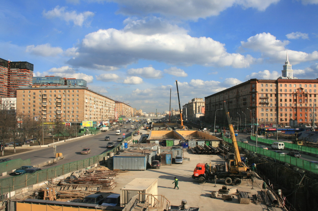 Вид на Ленинградский проспект во время реконструкции.